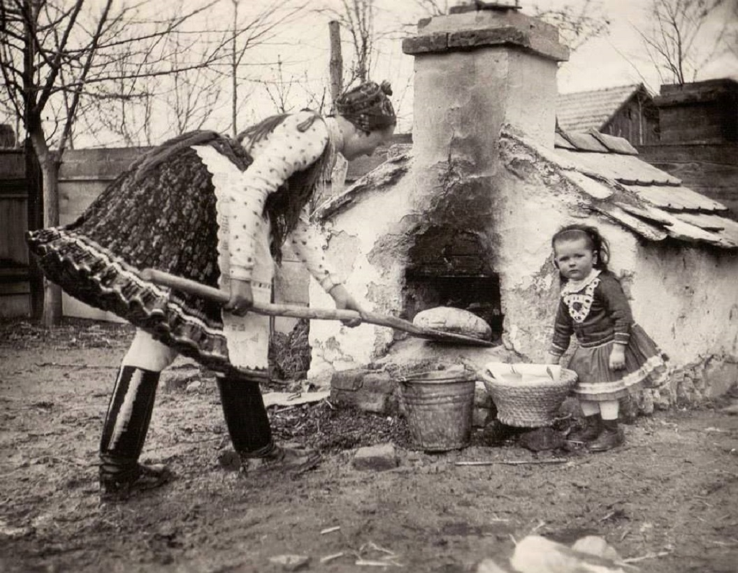 Nagymamám kenyérsütő kemencéje